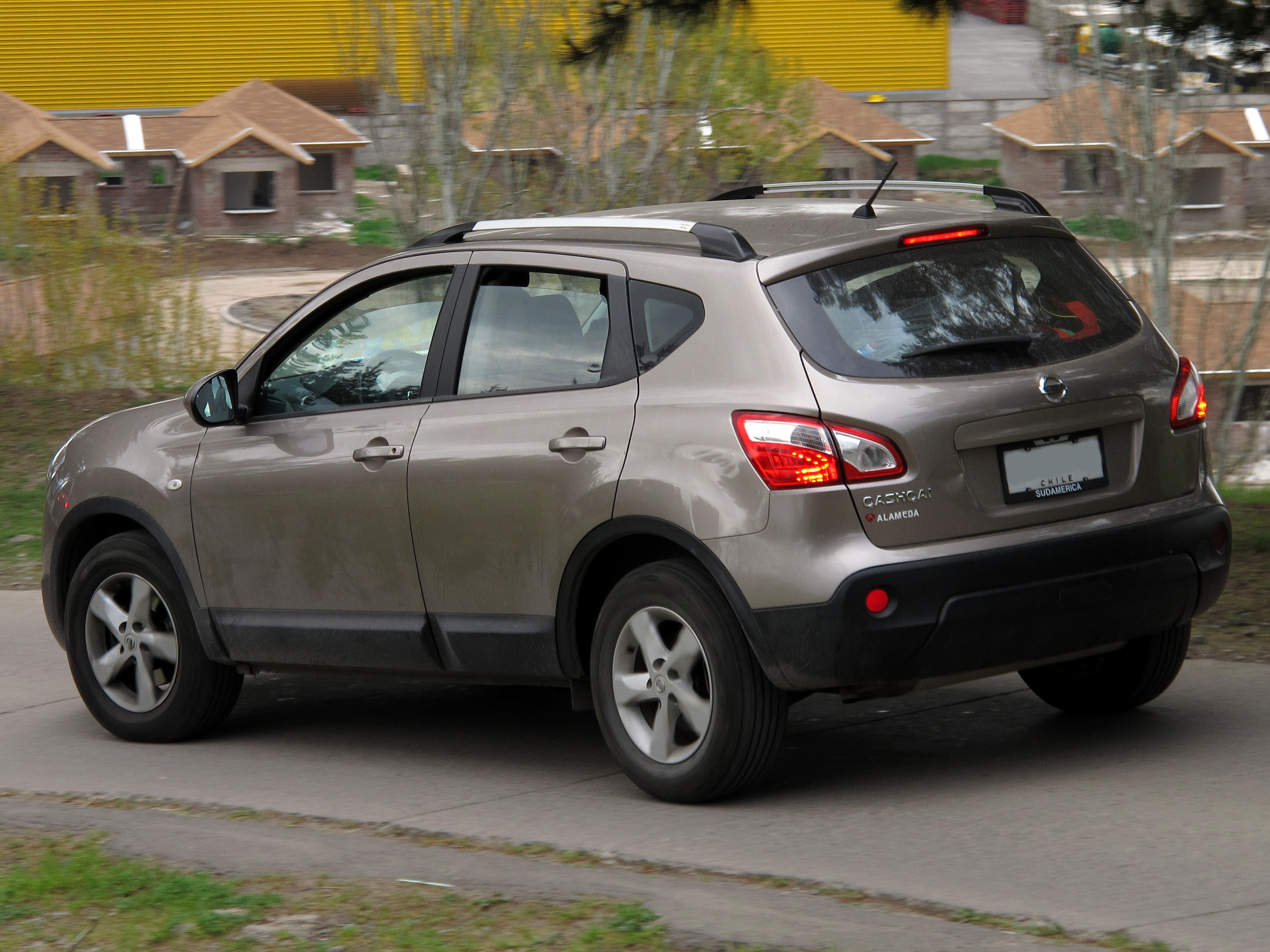 Nissan Qashqai 1.6 2013